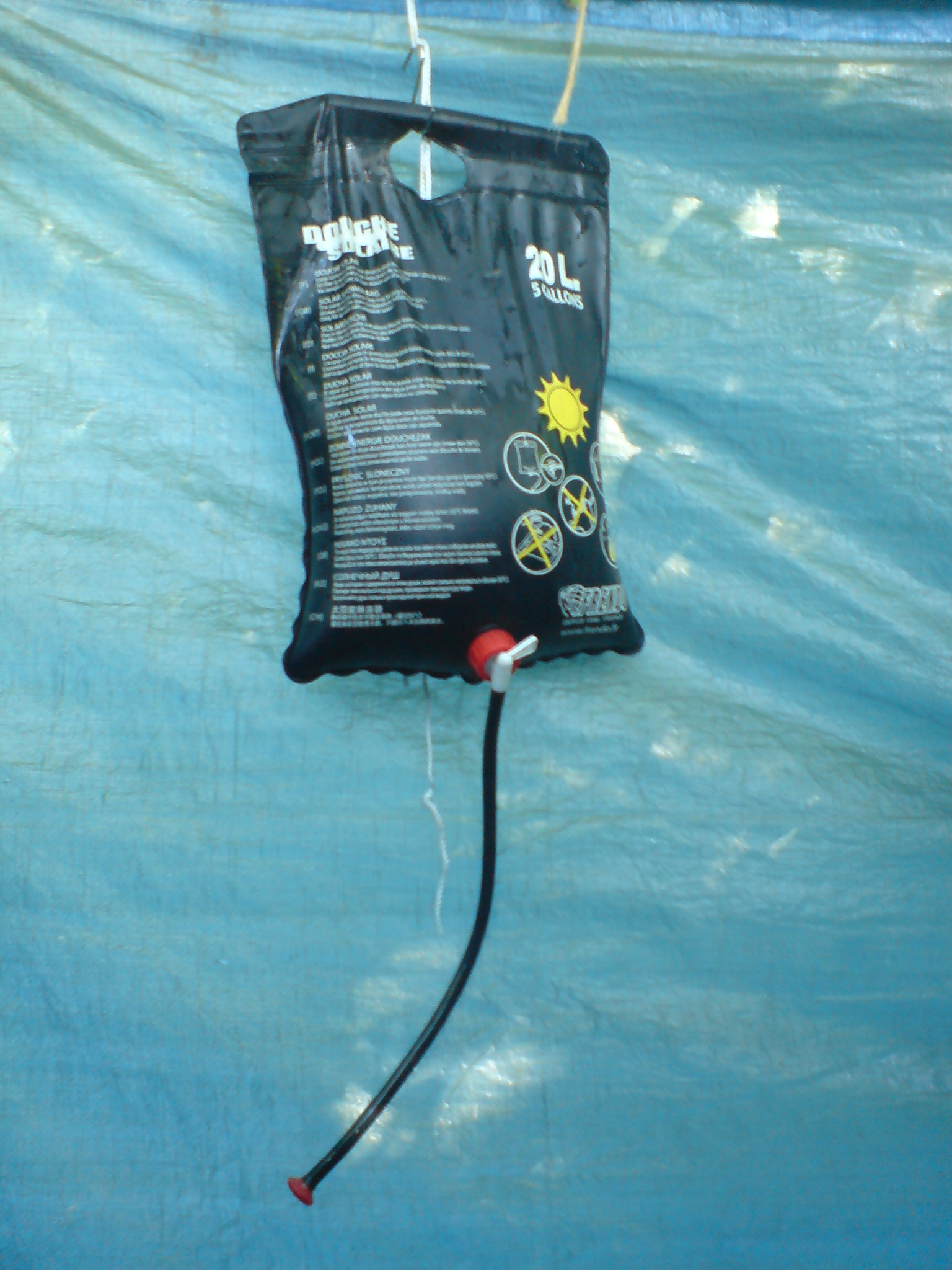 Il s'agit d'une douche solaire de marque frendo.